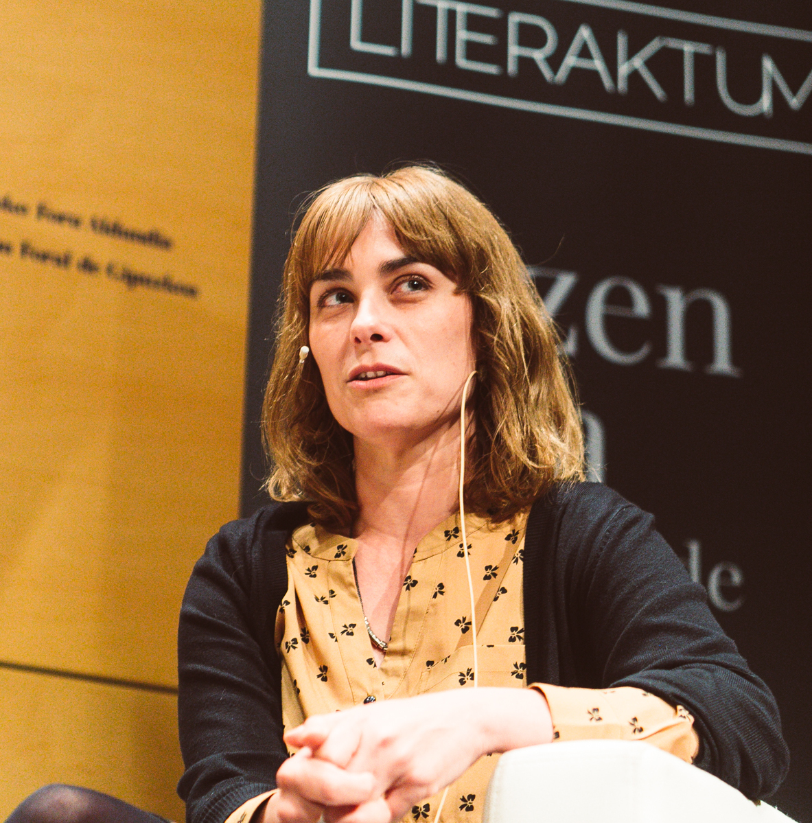 Literaktum 17 Koldo Mitxelena Kulturunea Argazkilaria/fotógrafa: Lorena Otero Literaktum 2017